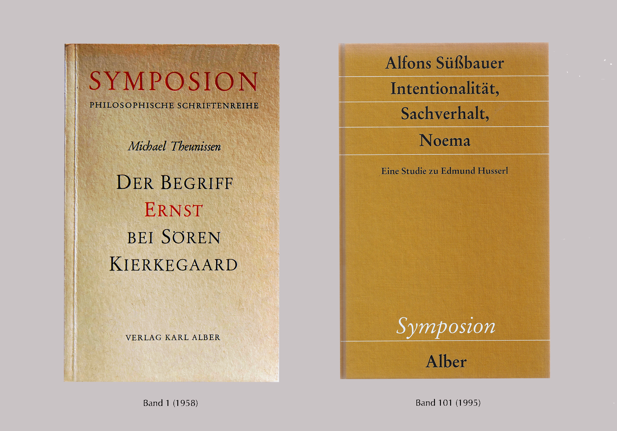 SYMPOSION Bund 1 und Band 101